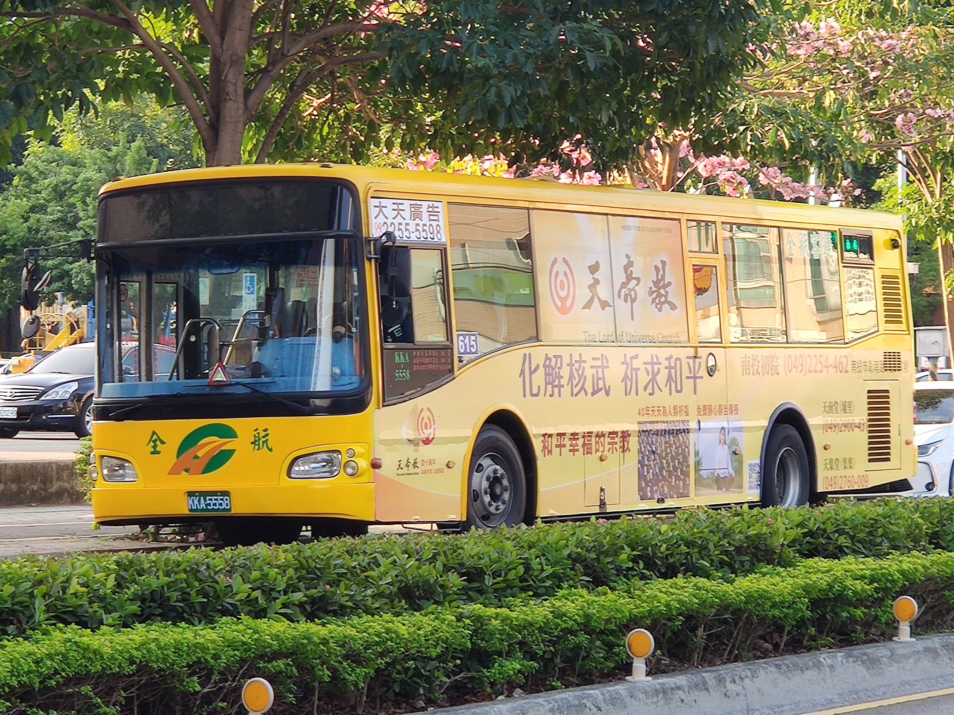 全航客運 HINO RK8JRSA 大客車 KKA-5558